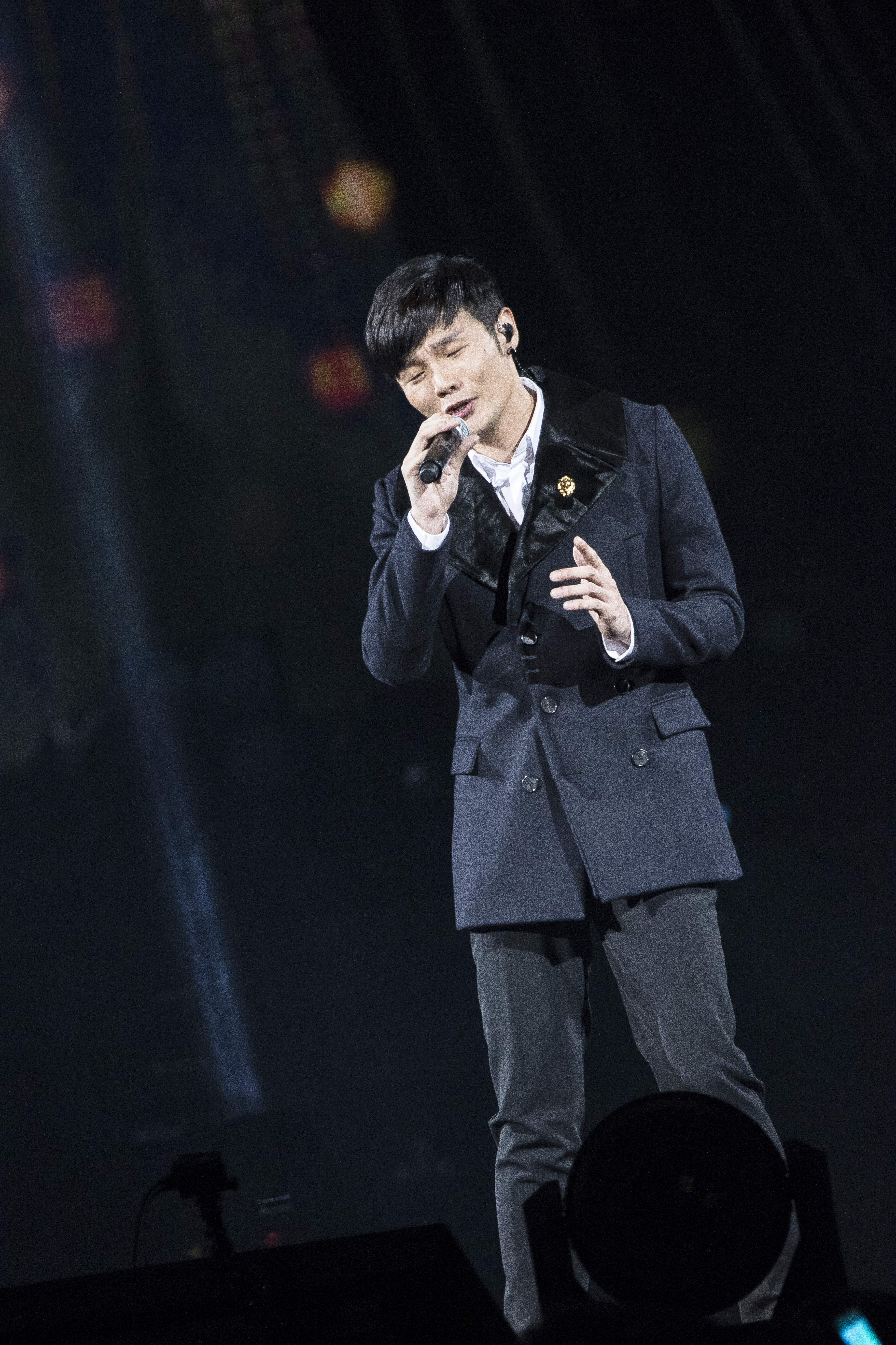 中文（台灣）: 李榮浩出席第十屆KKBOX風雲榜。